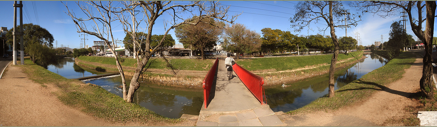 Arroio Dilúvio, em Porto Alegre, Brasil, na altura entre os bairros Santana e Santa Cecília. Imagem composta de 19 fotos, usando os programas AutoStitch para composição básica e Photoshop para correções manuais.